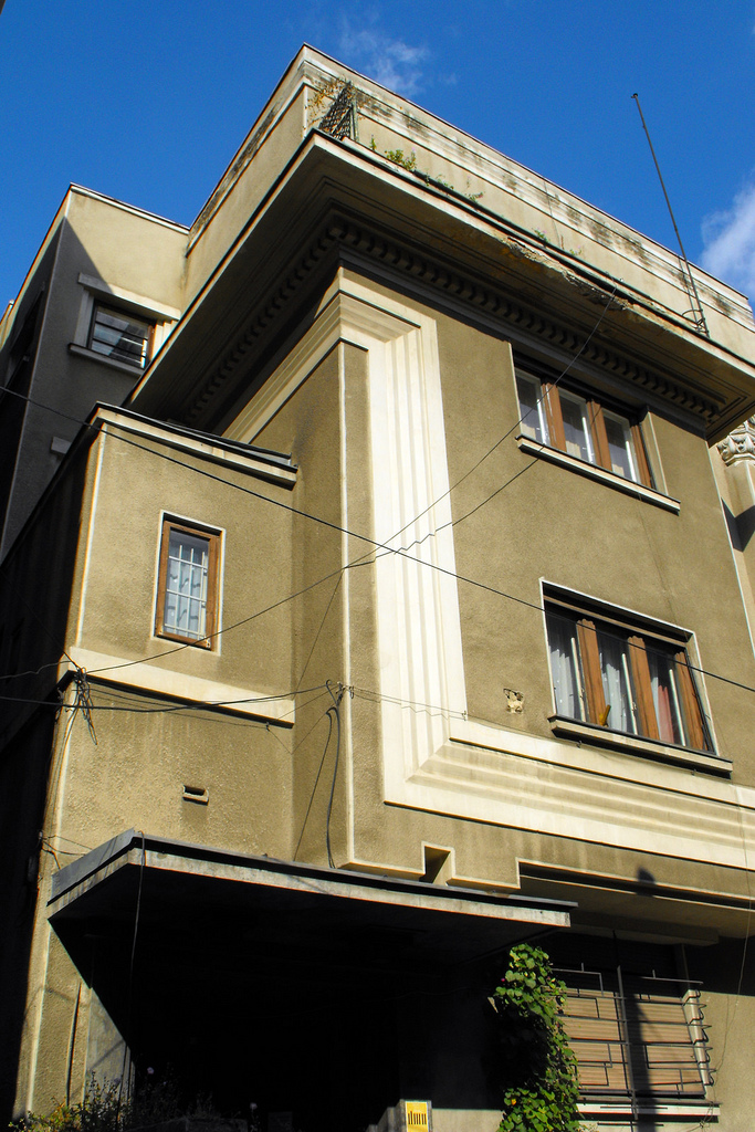 Muzeul C. C. şi C. A. Nottara